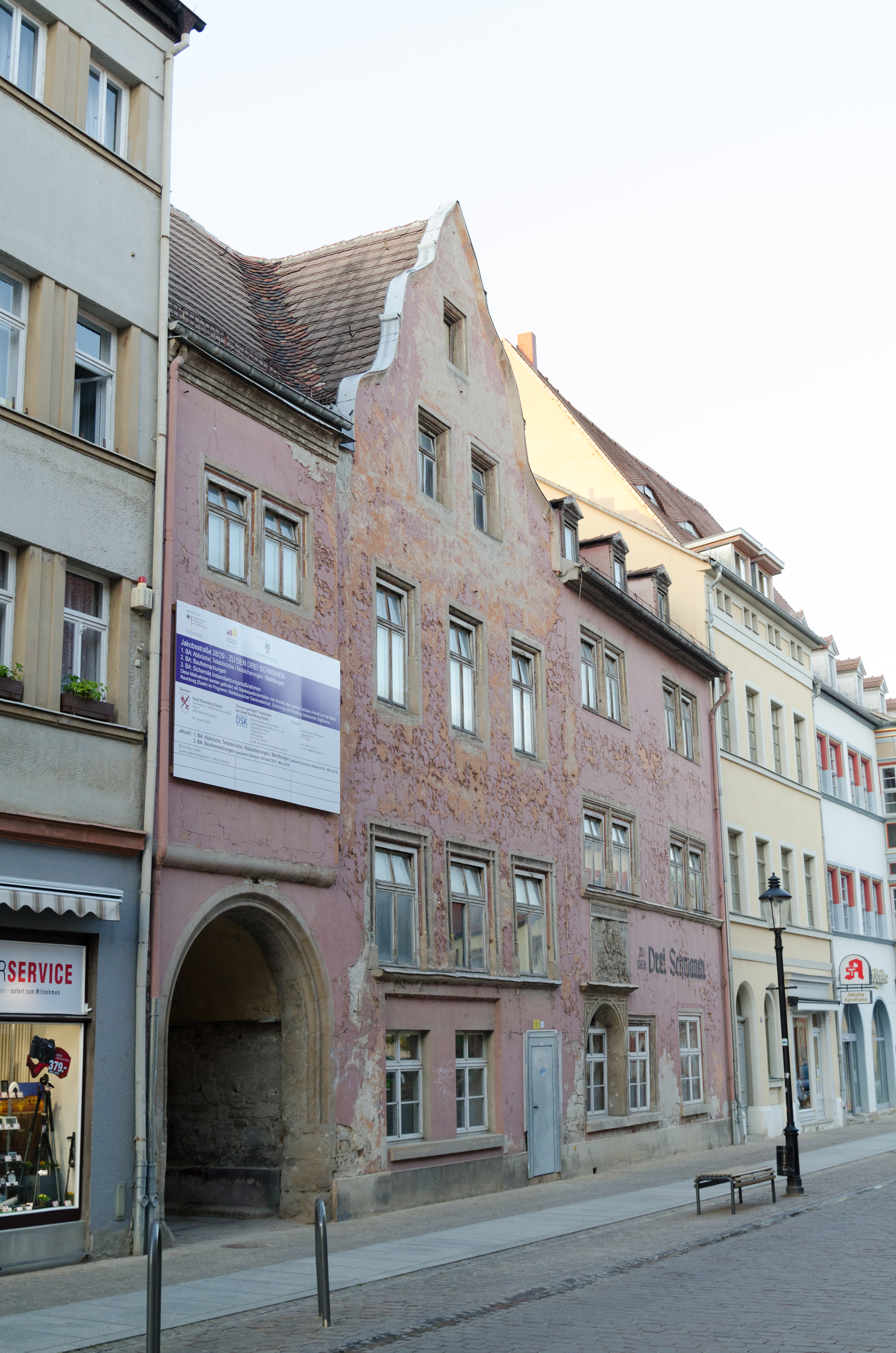 Naumburg, Jakobstraße 29